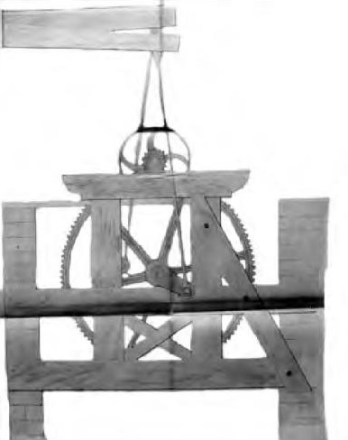 Salines de Mélecey : pompe d'exhaure.